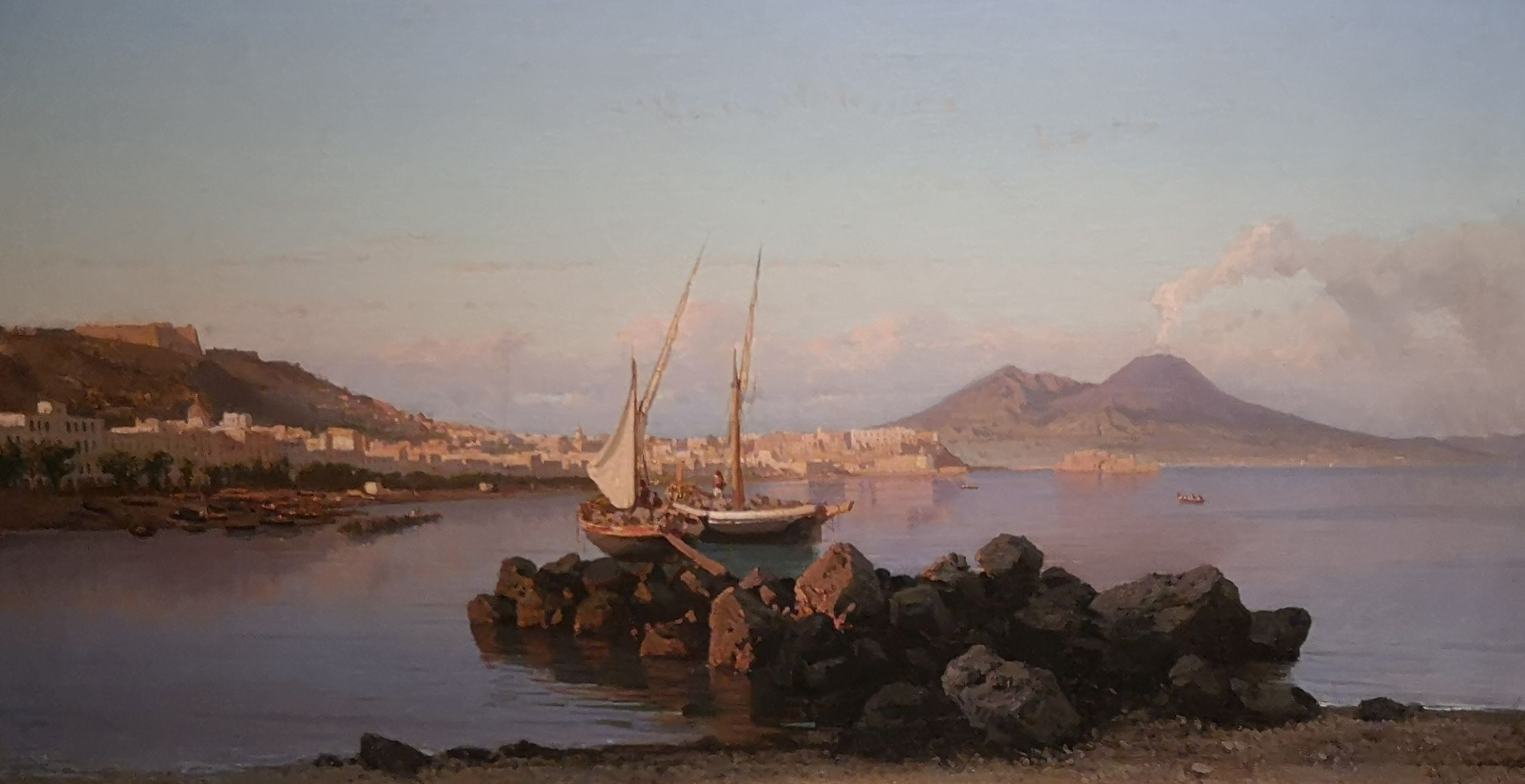 Alessandro la Volpe, Scena di pesca nel Golfo di Napoli, 1866